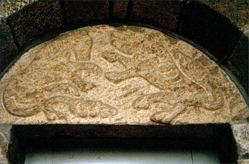 Mammen Kirke, (Viborg Kommune), Tympanon